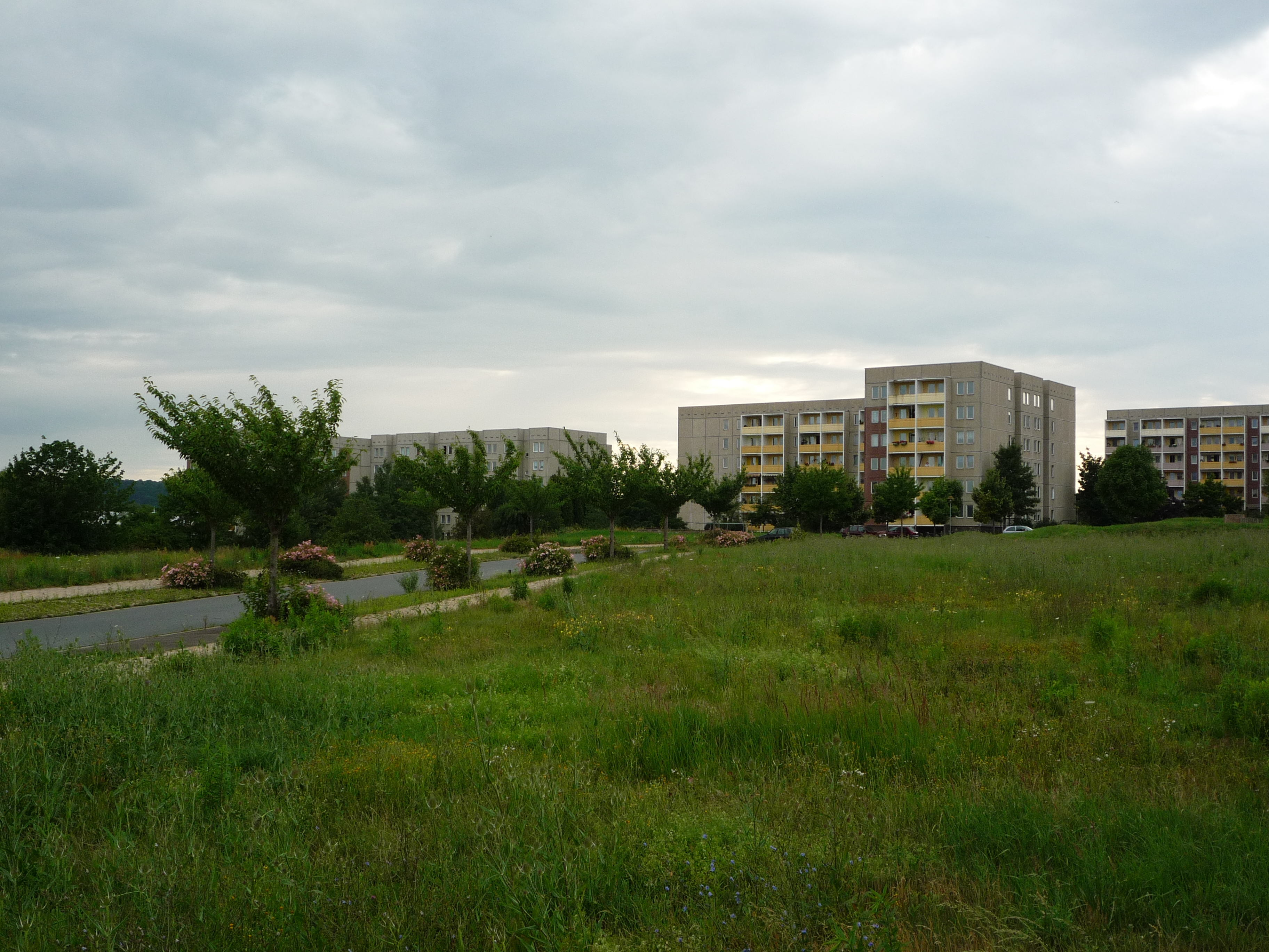 Plattenbauten an der Fellbacher Straße, Ecke Aritaring in Meißen